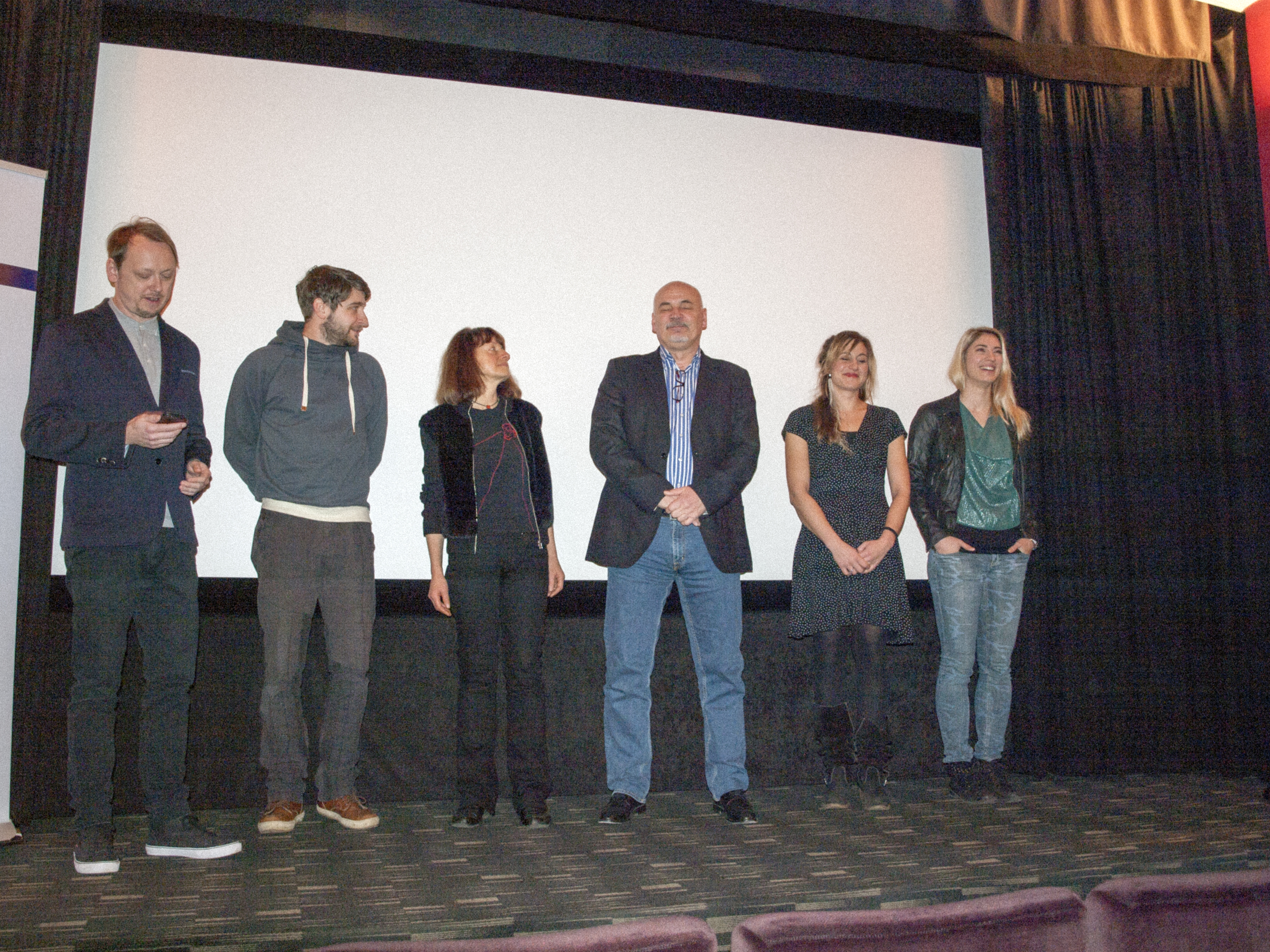 Novinařská konference seriálu Vraždy v kruhu 9.12.2014. Autor Karolína Černá pro & 10Mpix.cz